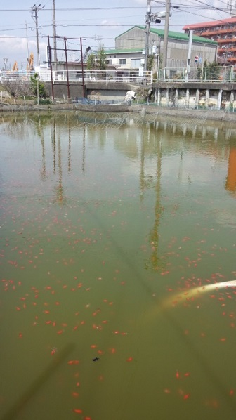 弥富金魚養殖池（愛知県弥富市鯏浦町車新田148） - 弥富市内にある金魚の生簀。戦後昭和時代は至る所で見られたが、次第に宅地化が進みその数は年々減少している。